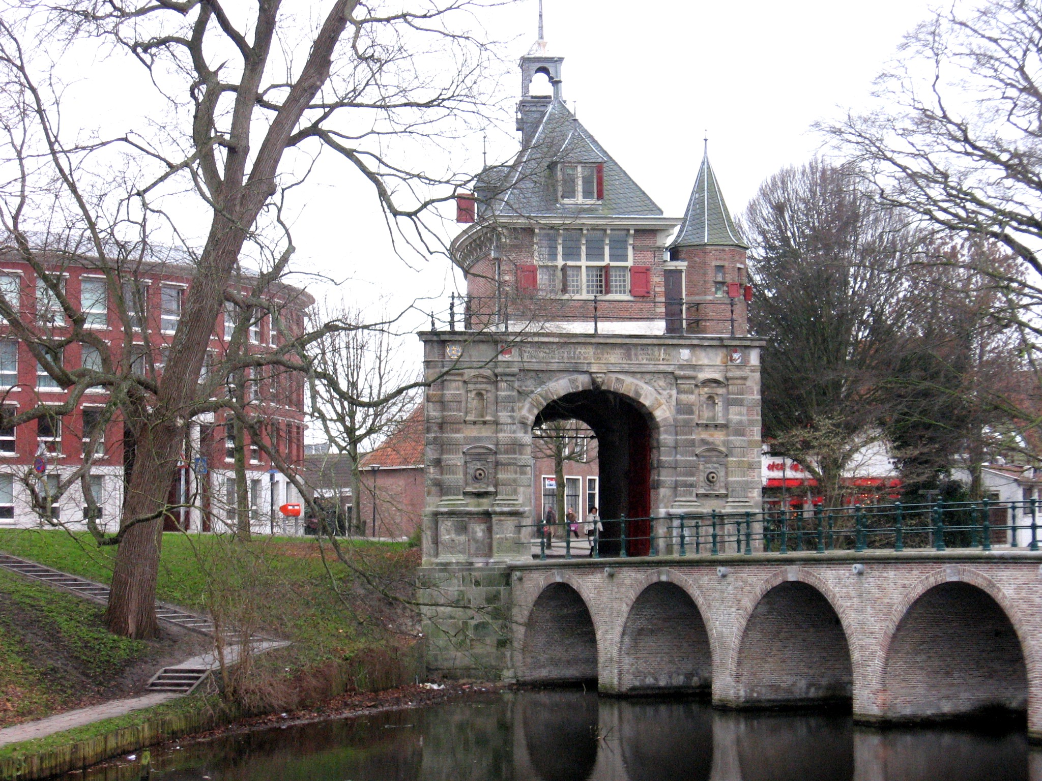 Hoorn, dec 2006